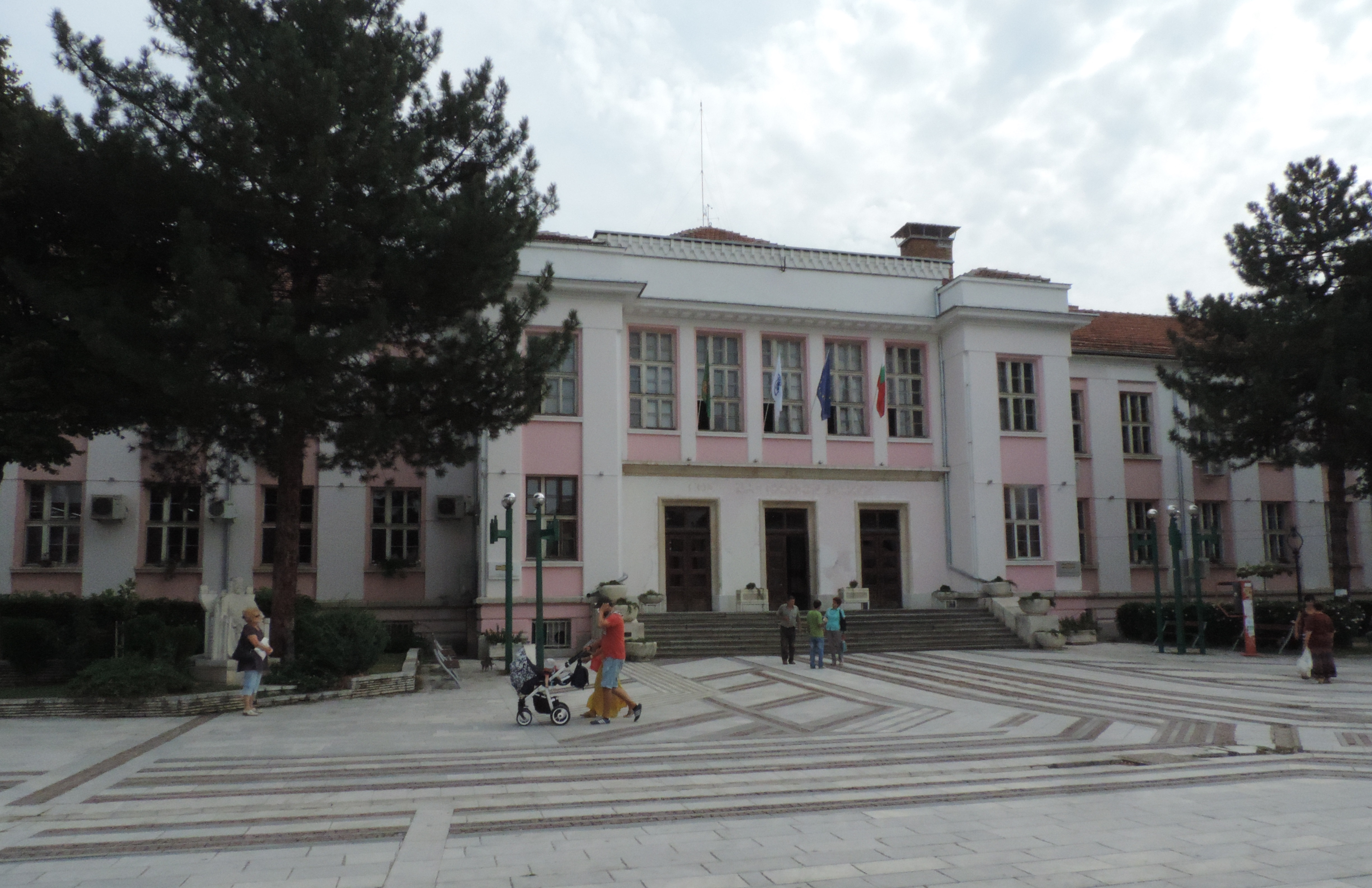 СОУ „Цар Симеон Велики“ във Видин